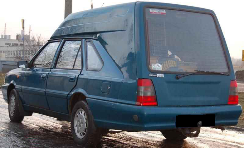 Daewoo-FSO Polonez Cargo Plus (FSO-ZTS Grójec)